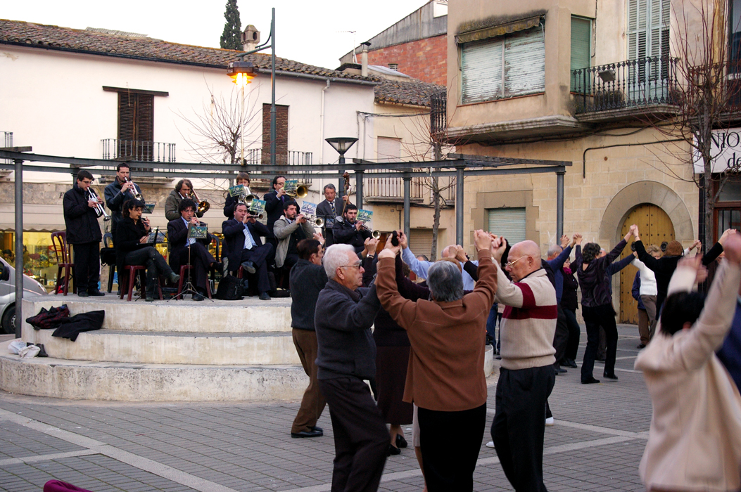 Ballada de sardanes durant la Fira de Sant Antoni a Anglès (La Selva, Catalunya)